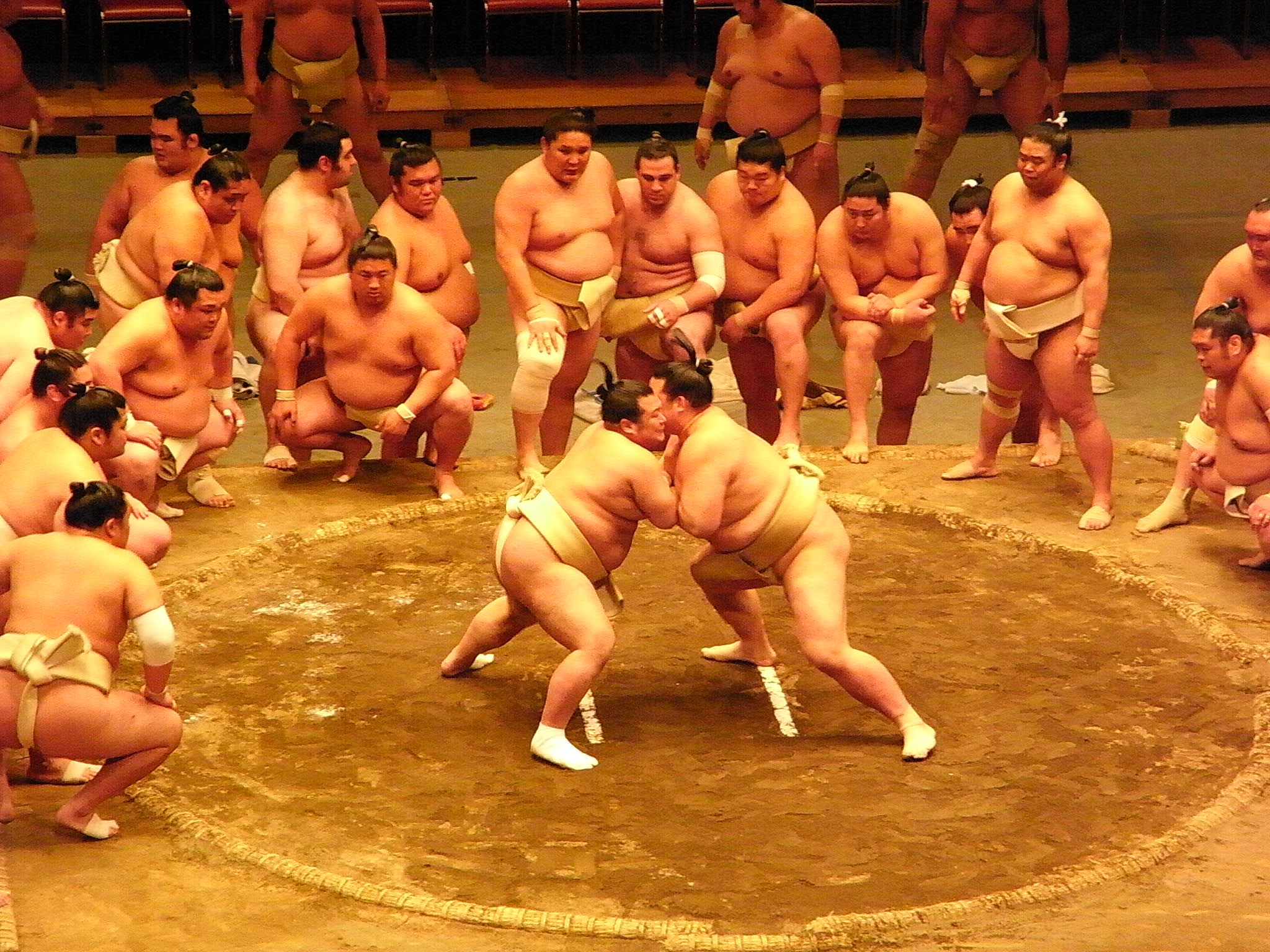 時天空慶晃